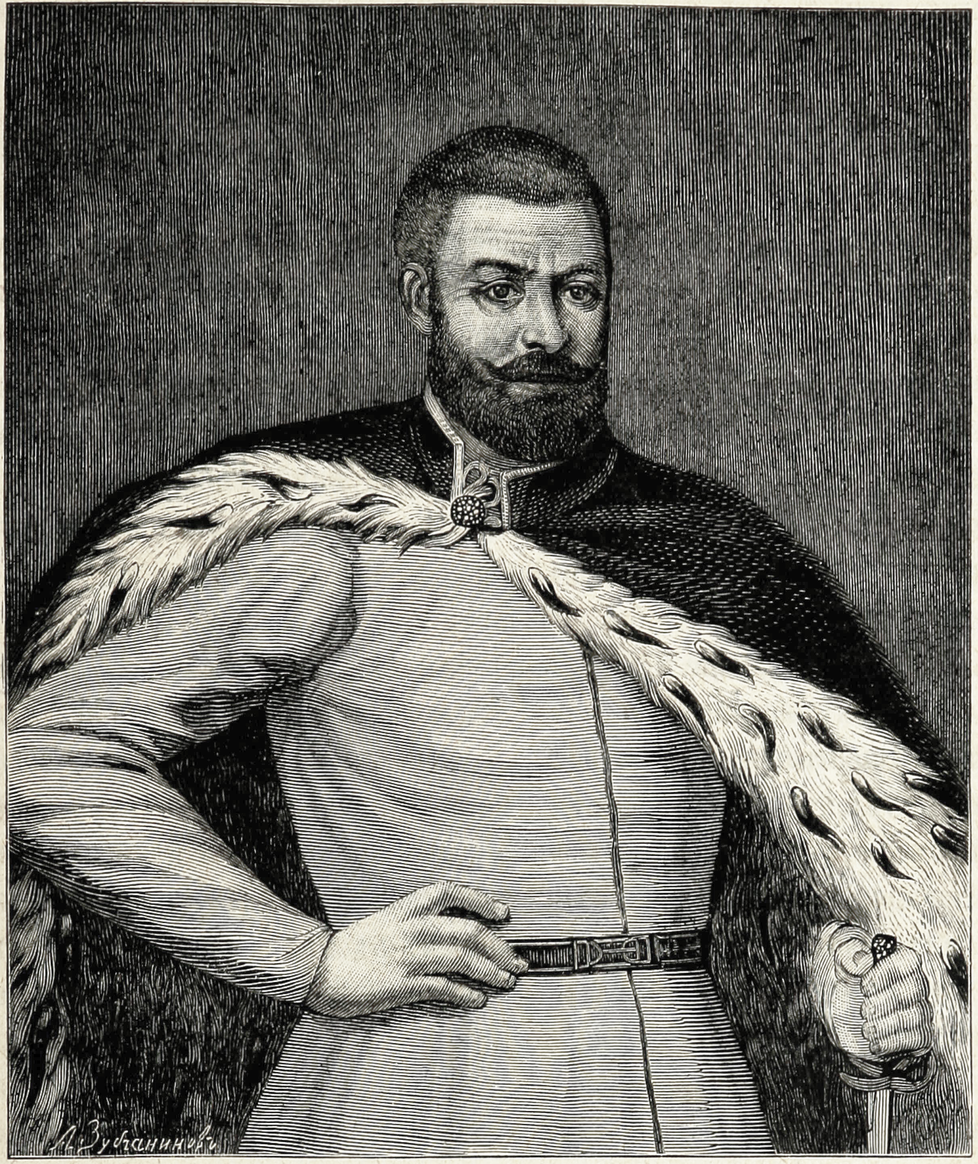 Беларуская (тарашкевіца): Партрэт Рыгора Хадкевіча (Ryhor Chadkievič)